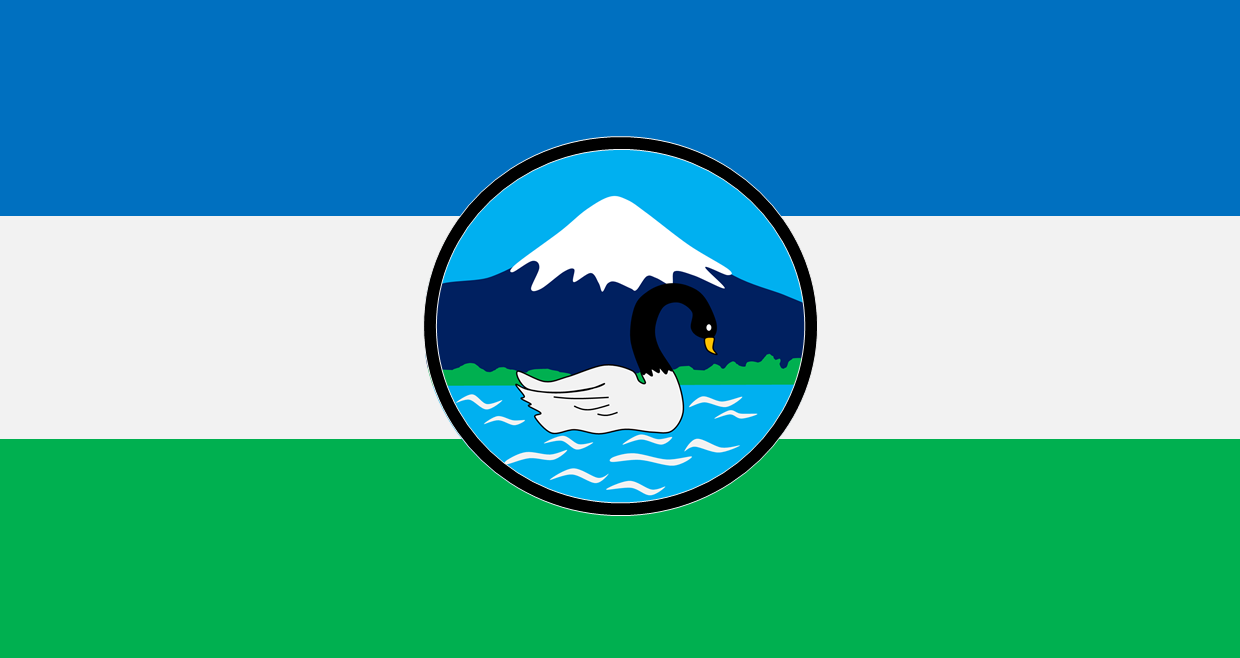 Bandera de la comuna y ciudad de Llanquihue (Chile)